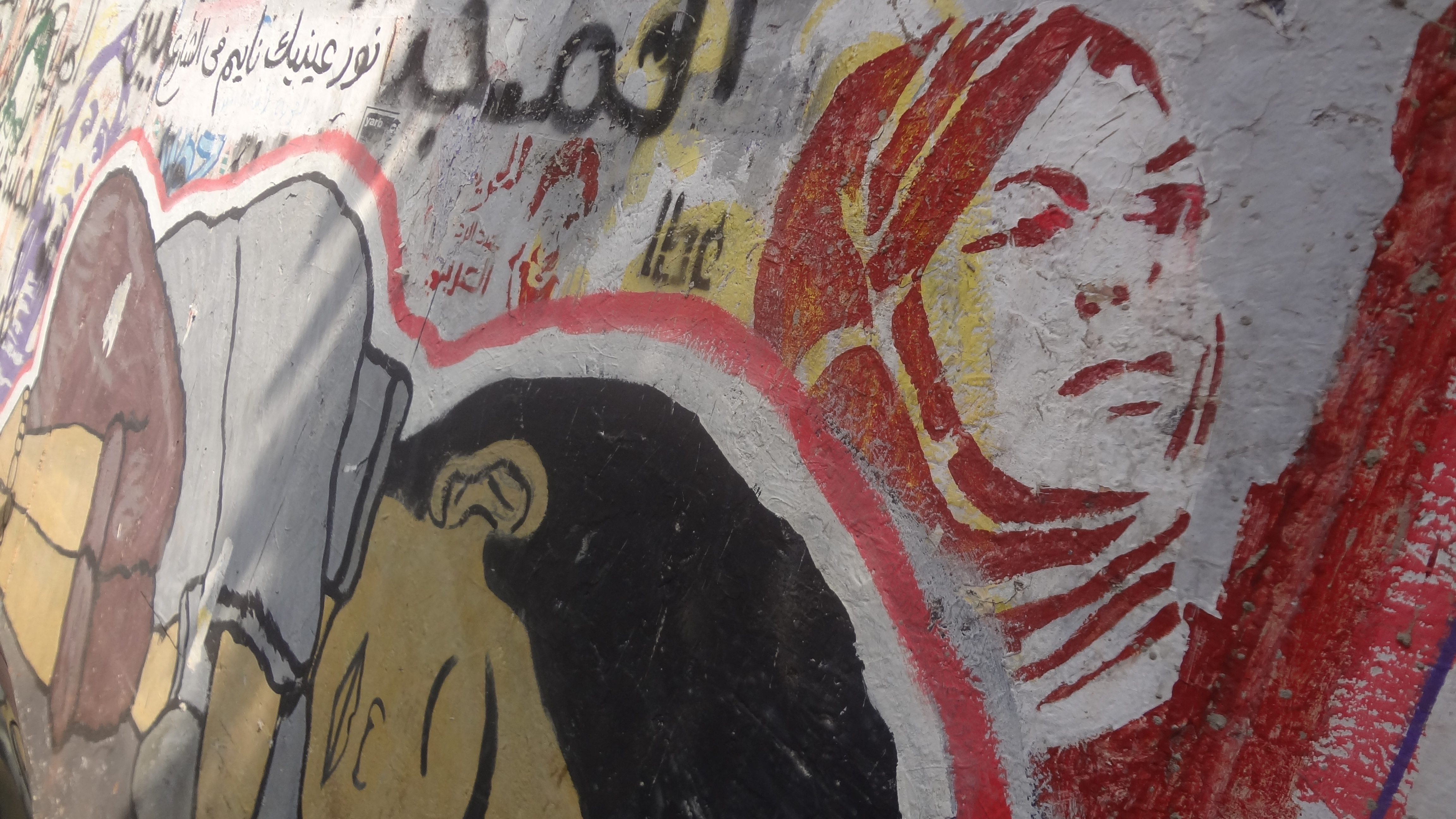 جرافيتي شارع محمد محمود بميدان التحرير، يظهر أسماء محفوظ وبجانبها طفل ينام في الشارع